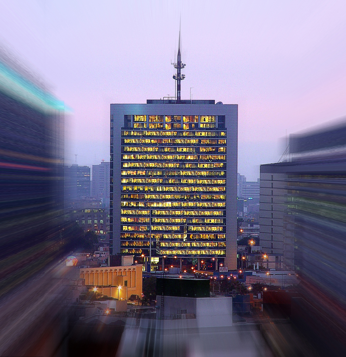 Oficina Principal de Luz del Sur